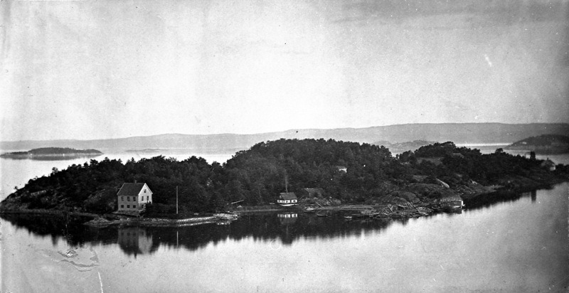 Sjursøya island in Oslo, Norway